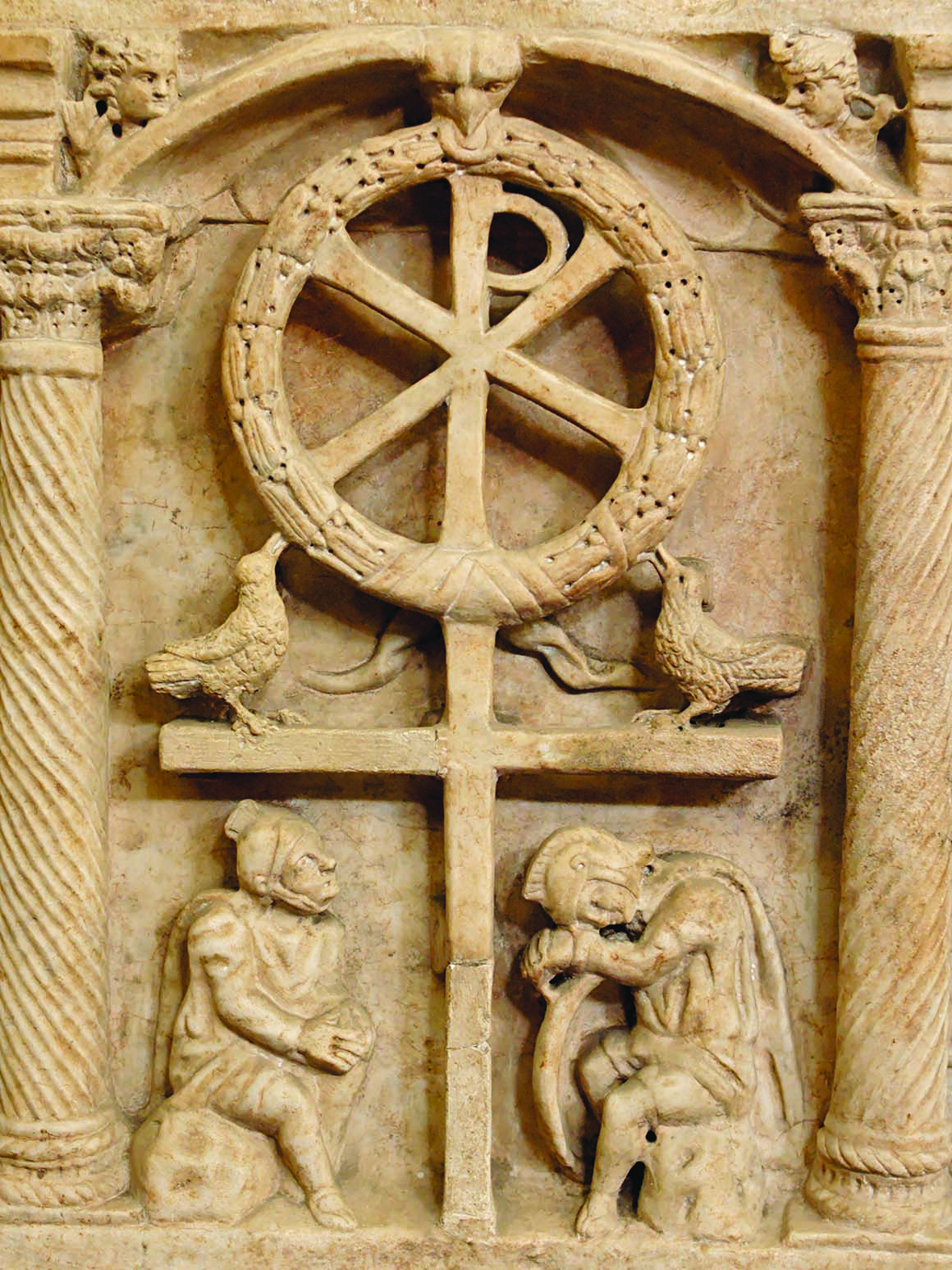 Este simbolo foi visto por constantino i o grande enquanto estava no campo de batalha prestes a lutar contra o imperador Maxentius nas margens do rio Tibre tal simbolo ficou imortalizado como simbolo religioso e militar romano.